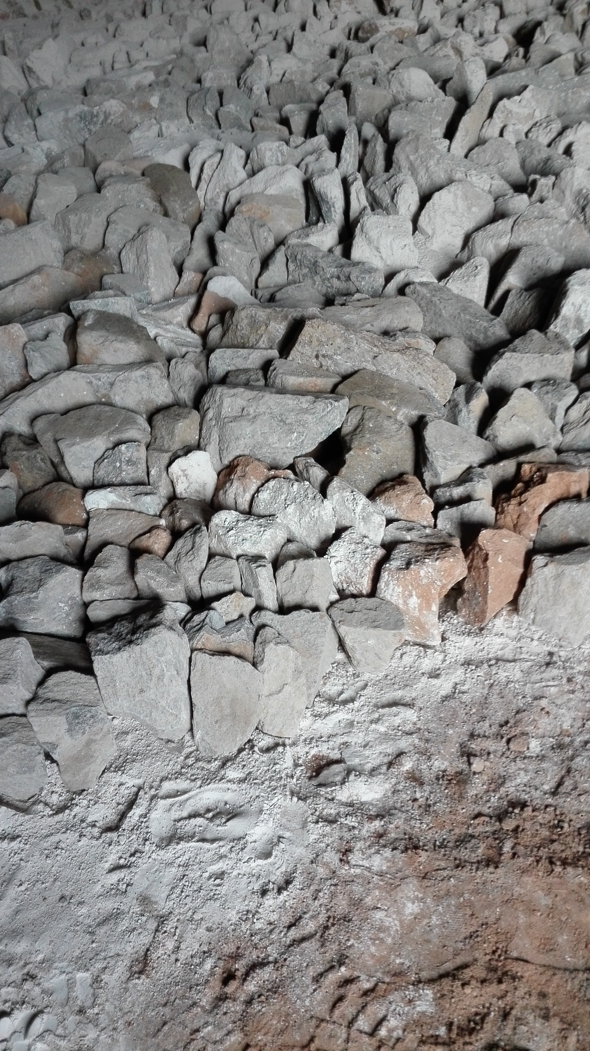 Hérisson de pierre sur terre battue et lit de chaux hydraulique. En cours de réalisation. Morbihan, Bretagne, France.